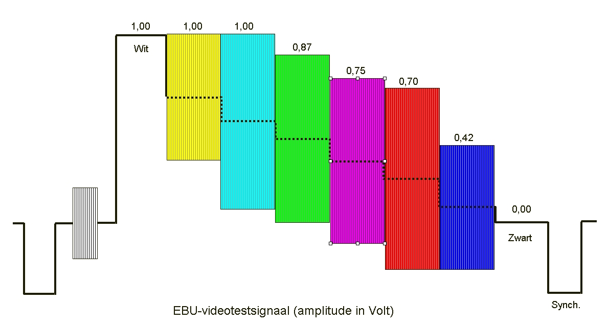 Door de auteur zelf vervaardigde afbeelding.